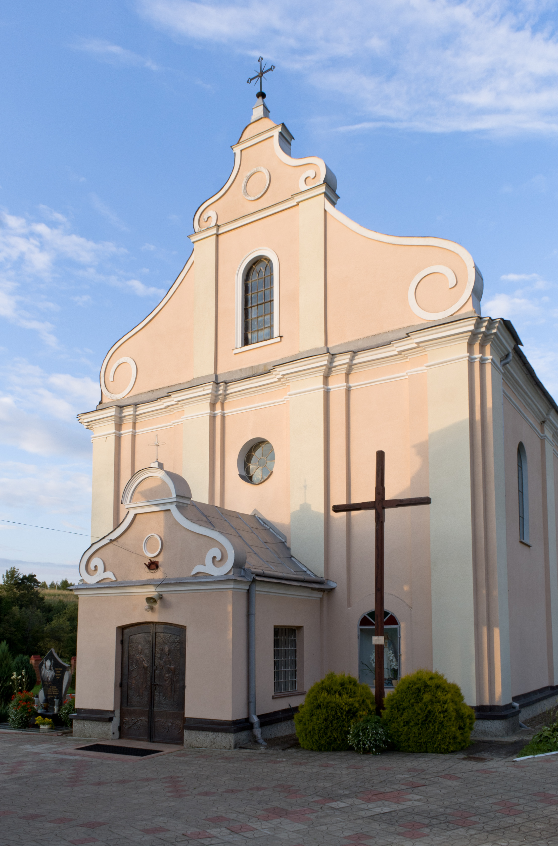 Kościół św. Stanisława Biskupa w Nozdrzcu